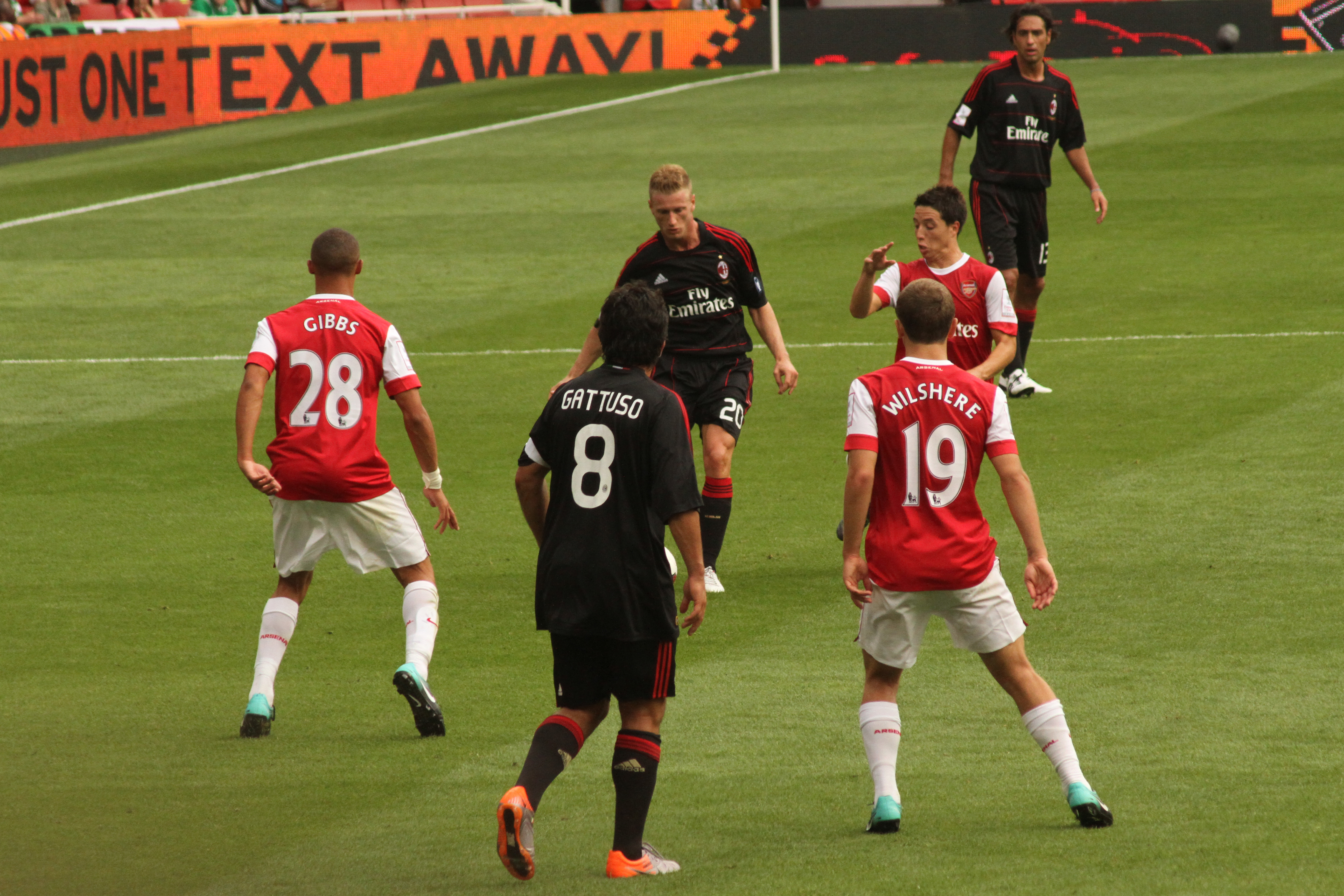 Kieran Gibbs, Gennaro Gattuso, Ignazio Abate, Jack Wilshere & Samir Nasri